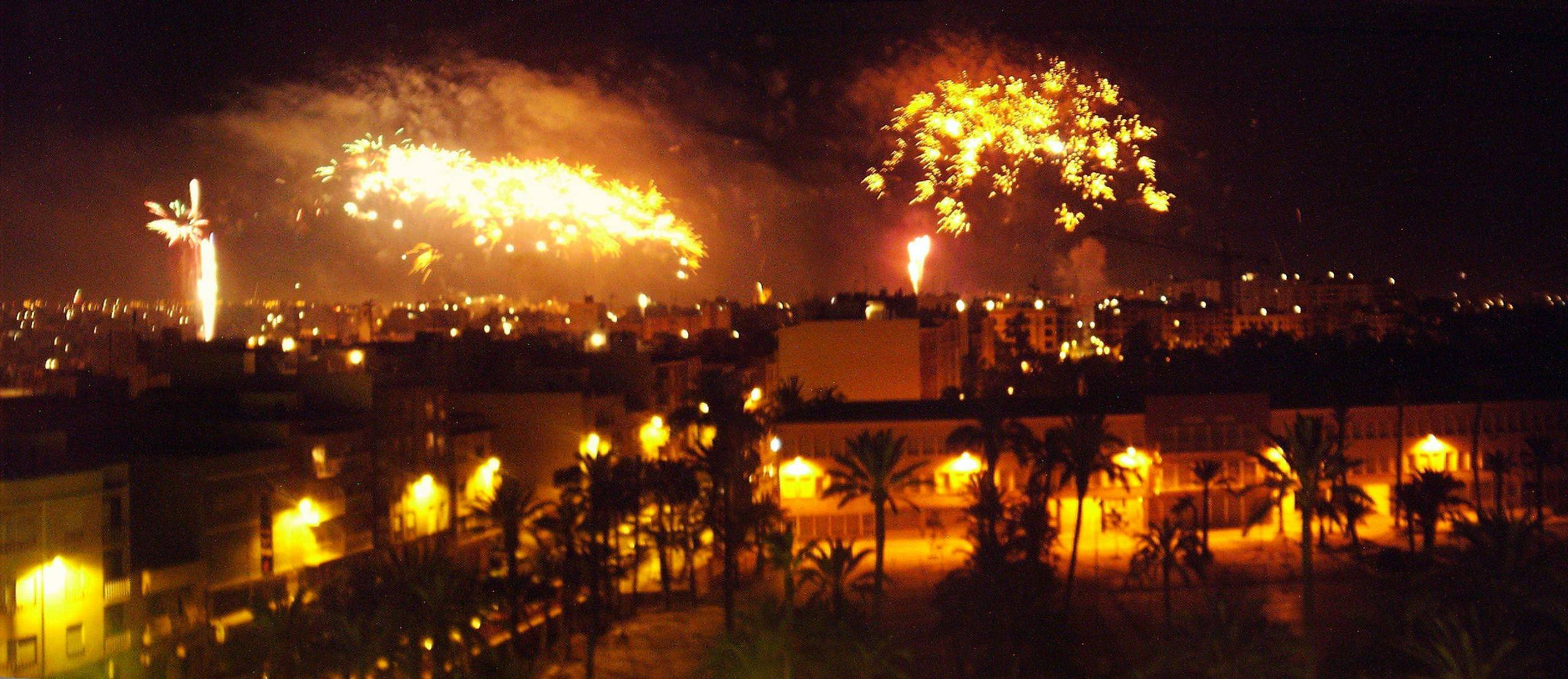 Fuegos artificiales en la Nit de l'Albà, en Elche, (Alicante) España